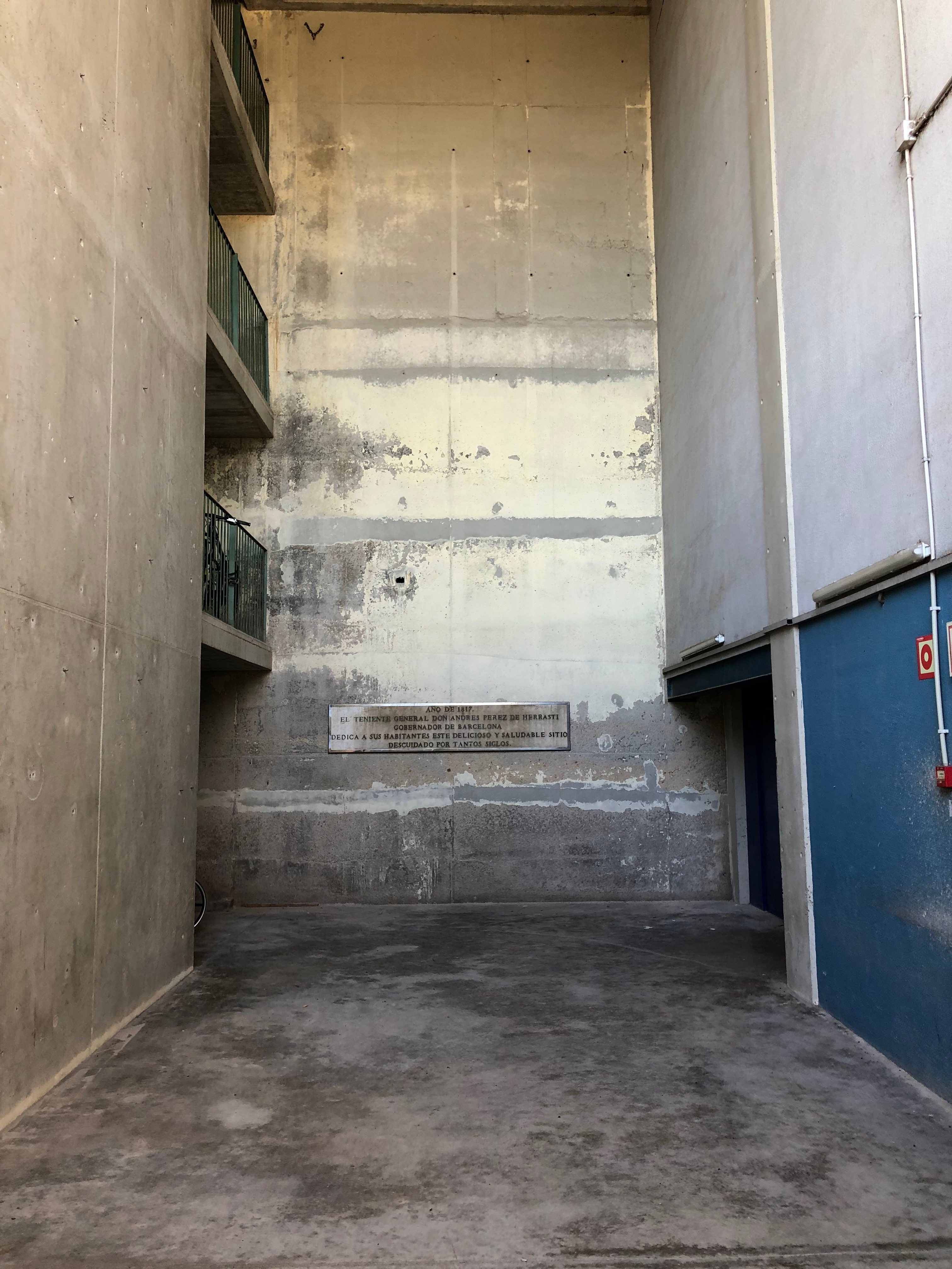 Actualment ubicada a les instal·lacions de la Piscines Municipal Montjuic.